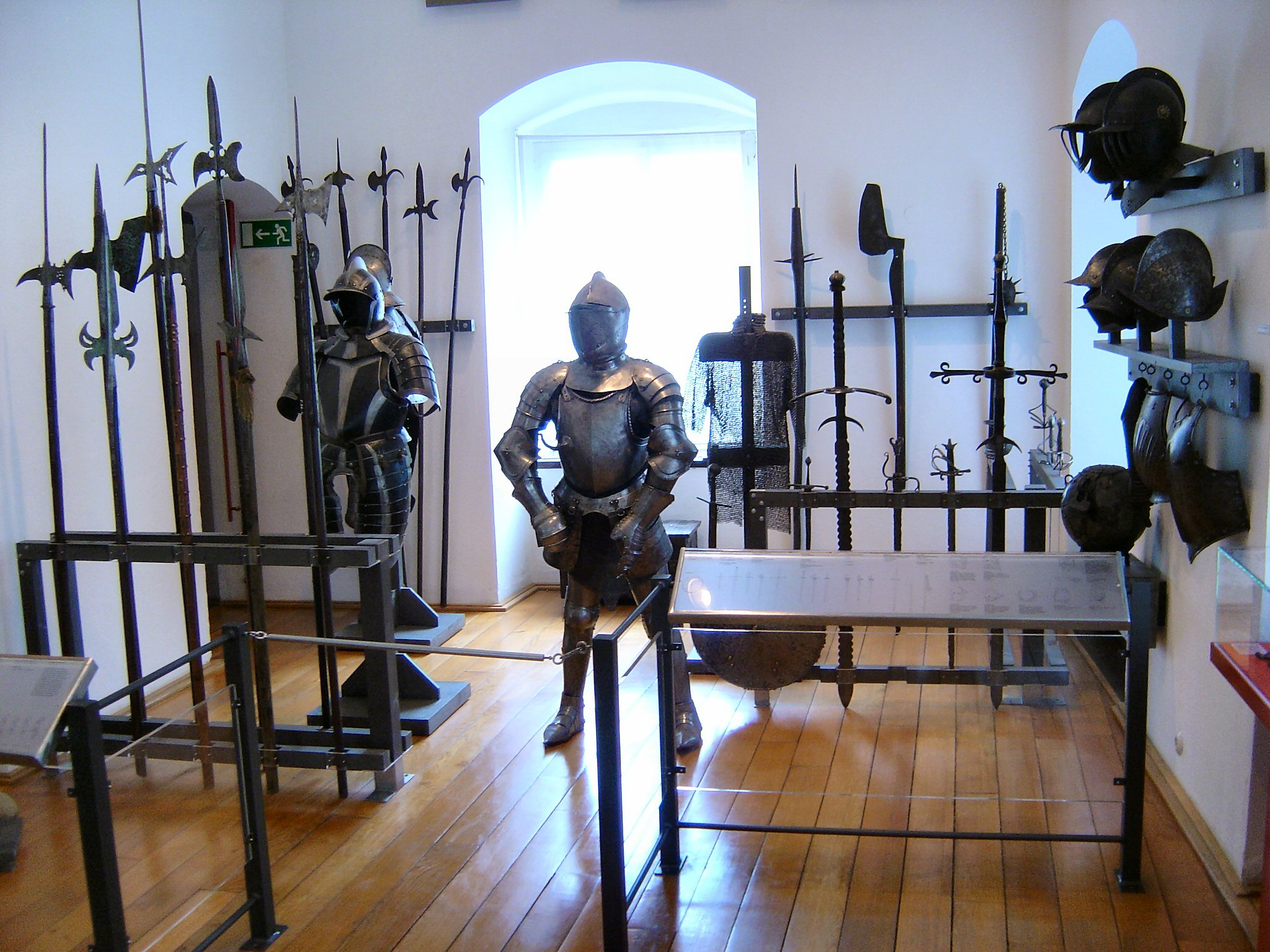 Ritter-Rüstungen,etc. in Schloss_Homburg_(Nümbrecht)